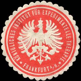 Sealing stamp Title: Königliches Institut für Experimentelle - Therapie - Frankfurt am Main Description: rot, weiß, geprägt Place: Frankfurt / Main size: 4 cm